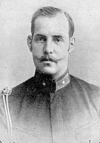 Константин I (1896)